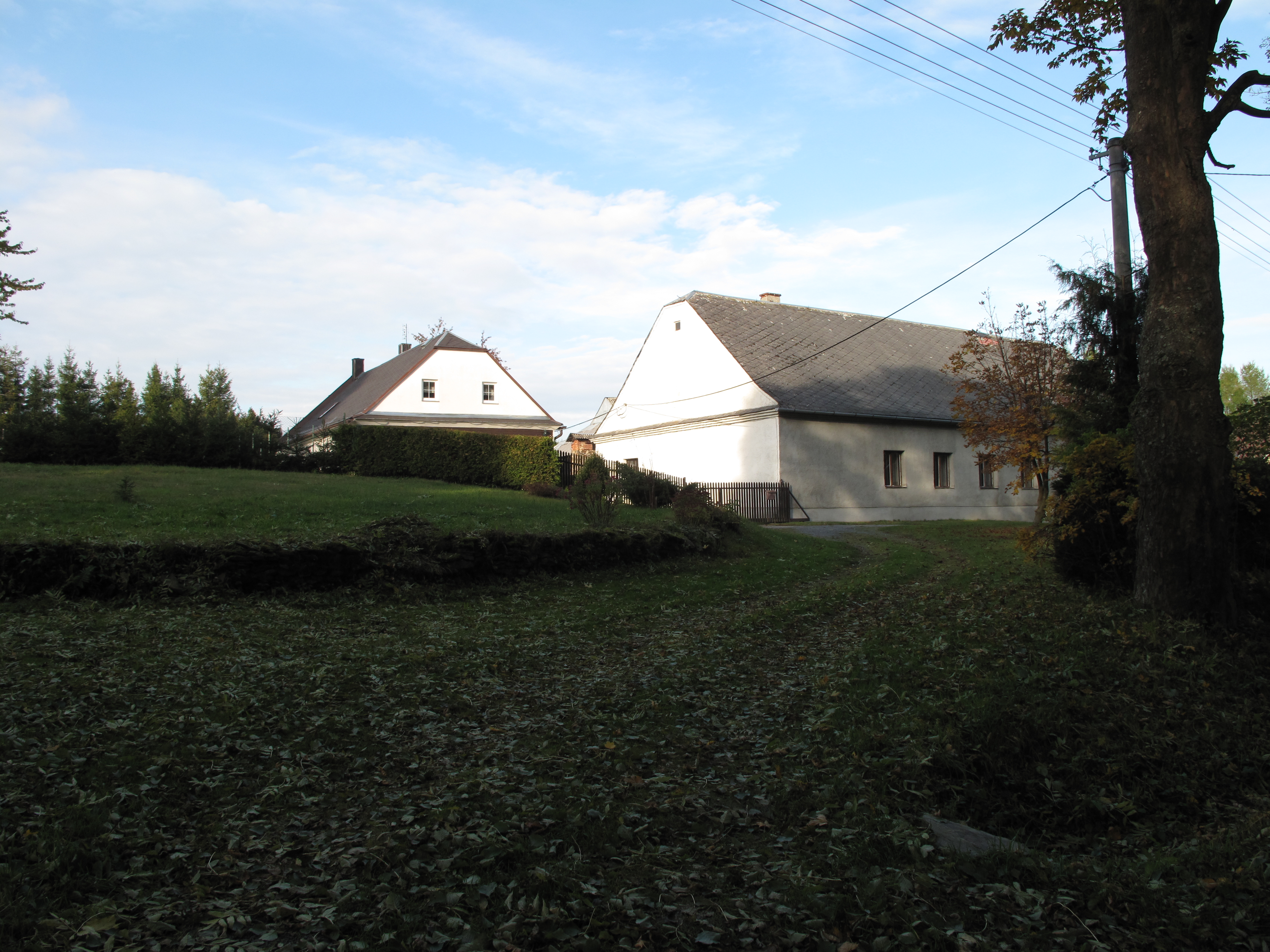 Nová Véska (Norberčany). Okres Olomouc, Česká republika.